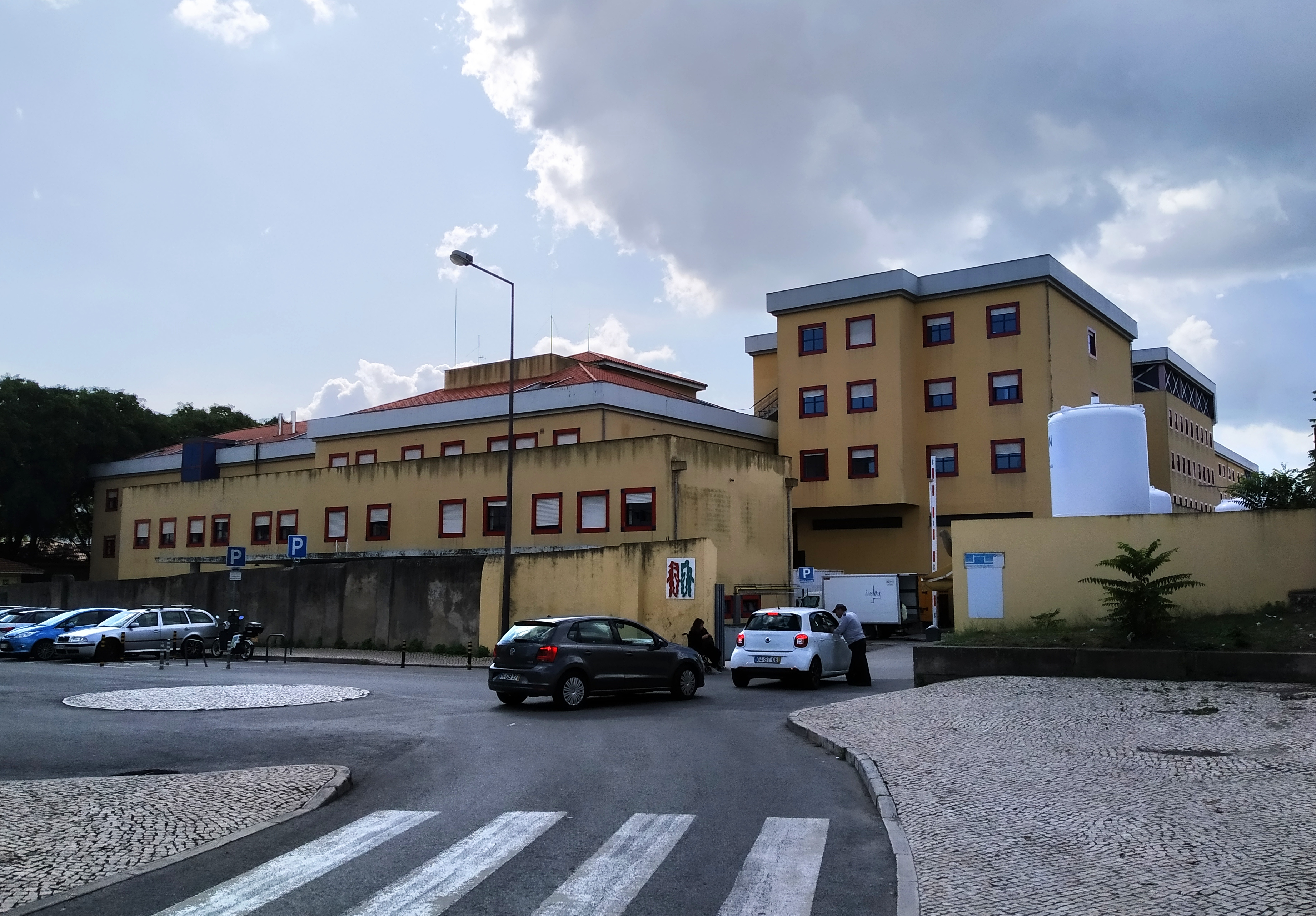 Entrada do Hospital Curry Cabral, na Rua Ivone Silva, Lisboa